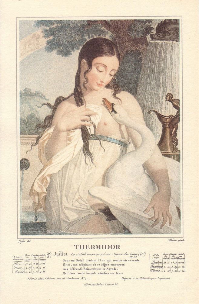 French Revolutionary Calendar THERMIDOR 20-21 Juillet: Le Soleil correspond au Signe du Lion Sous un Soleil brulant l'Eau qui tombe en cascade & les Jeux séduisans de ce Signe amoureux Aux délices du Bain invitent la Nayade Qui dans l'onde limpide attiédira ses feux